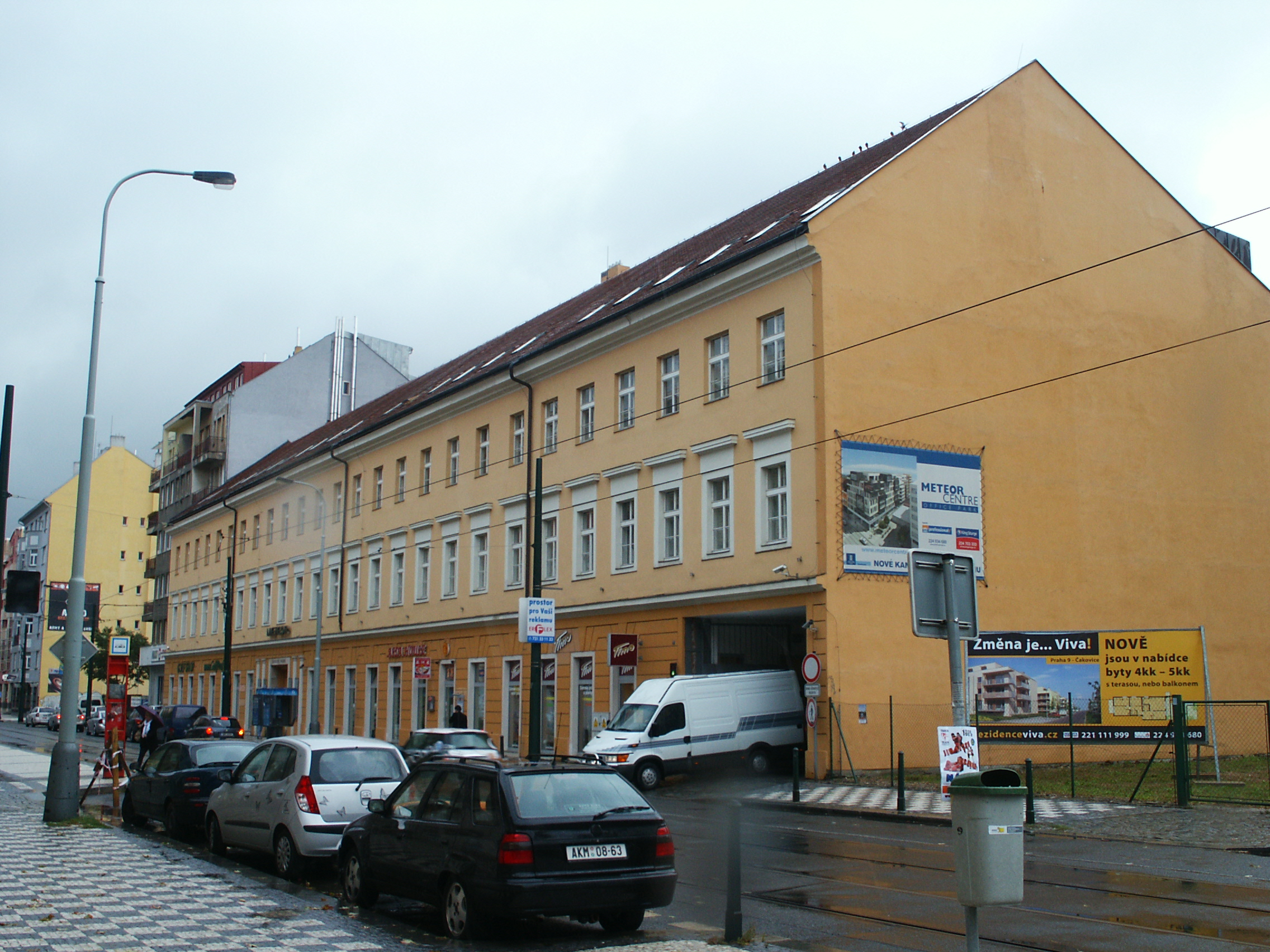 Praha-Karlín, Sokolovská 100/94, Meteor Office Park.